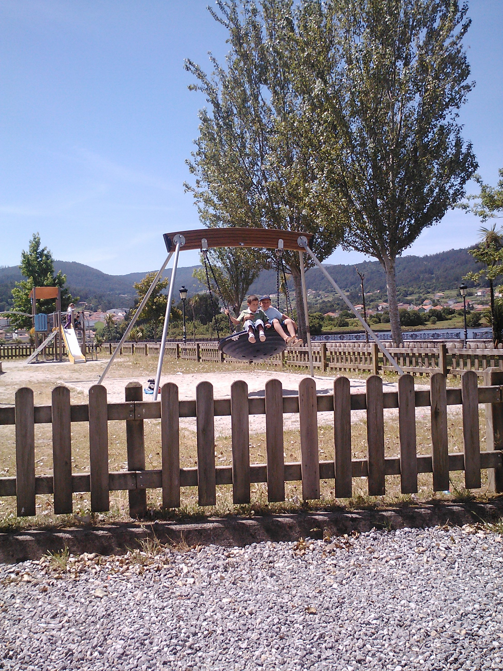 Área de juegos infantiles en Noia, Coruña, España